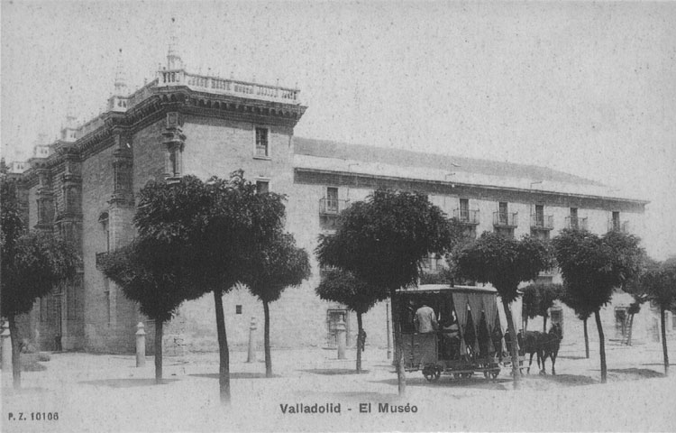 Museo de Bellas Artes (Palacio de Santa Cruz) - Valladolid - Colección Valladolid, postales para el Recuerdo, editada por el Diario El Mundo de Valladolid. Valladolid. Palacio de Santa Cruz donde estaba el Museo de Bellas Artes. - Fotografía. Papel 140 x 90 B/N